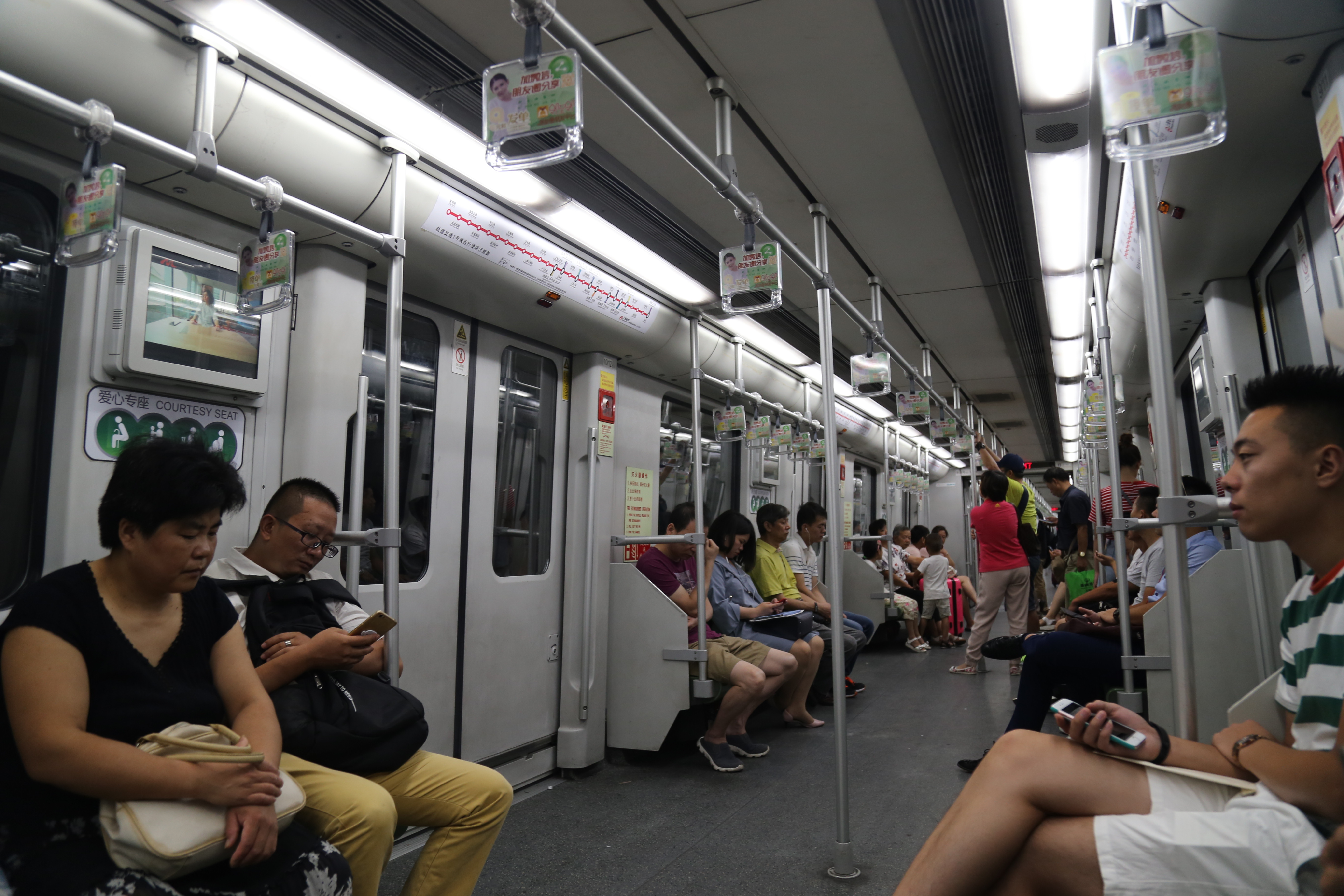 AC01B车厢内部